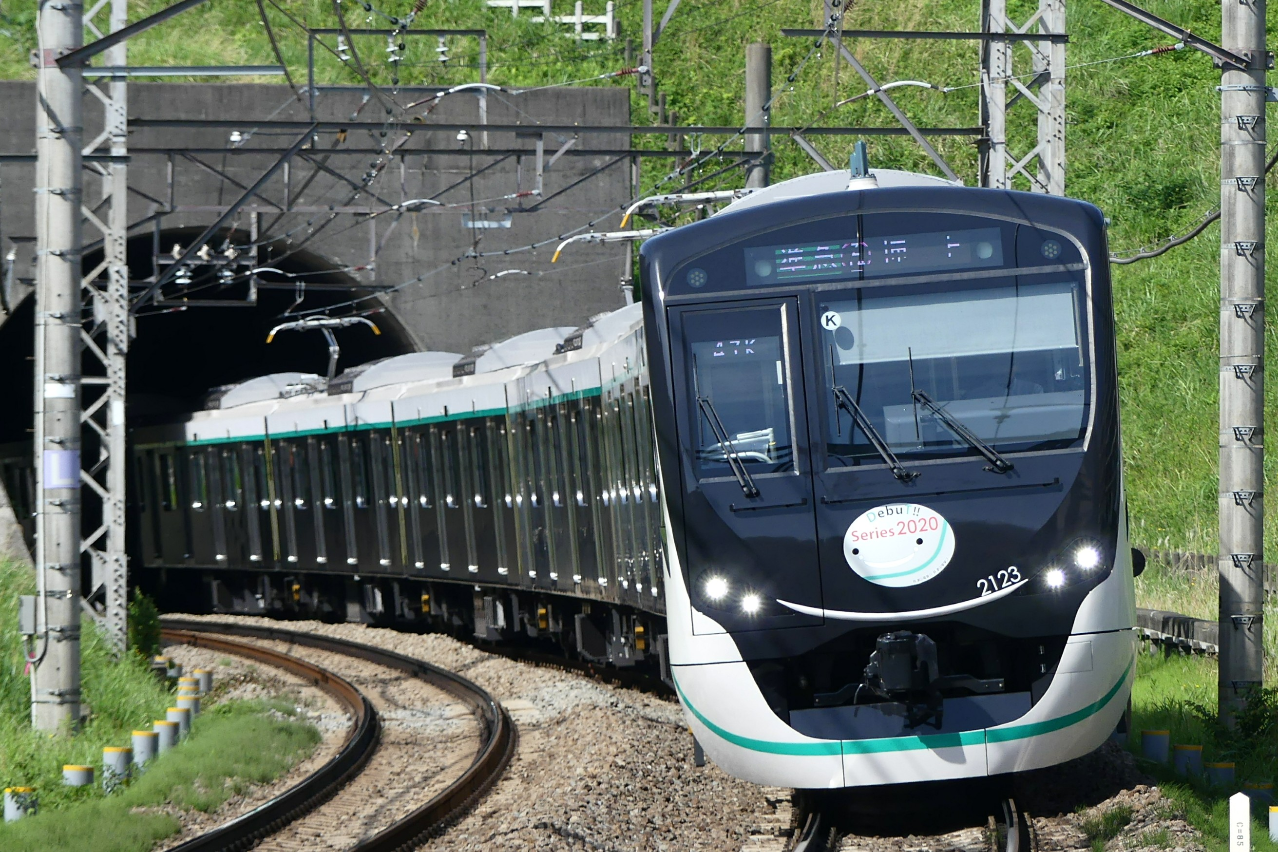 東急田園都市線2020系電車